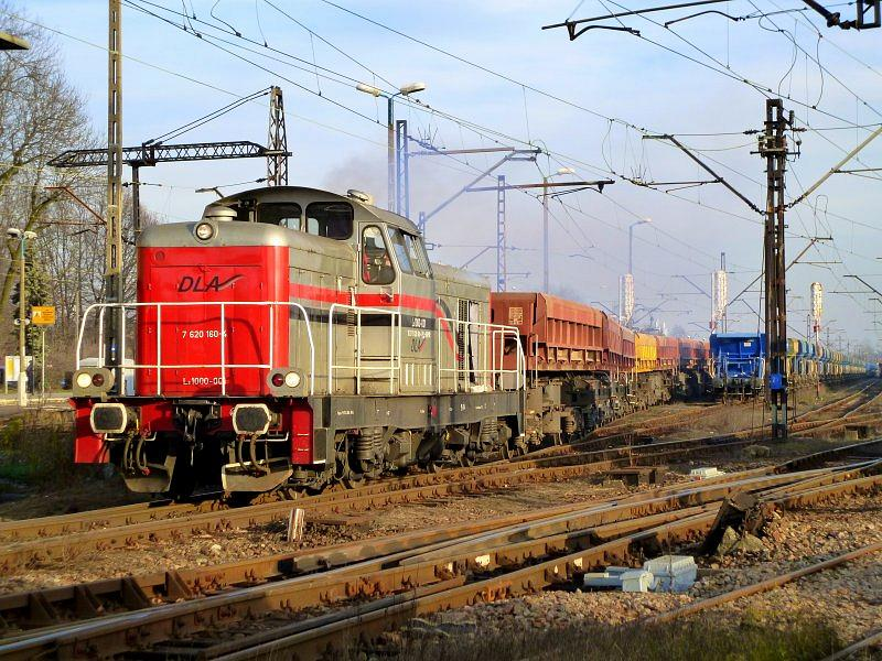 Spalinowóz Ls1000-001 należący do przedsiębiorstwa Dolnośląskie Linie Autobusowe wyjeżdża ze stacji Krzeszowice.